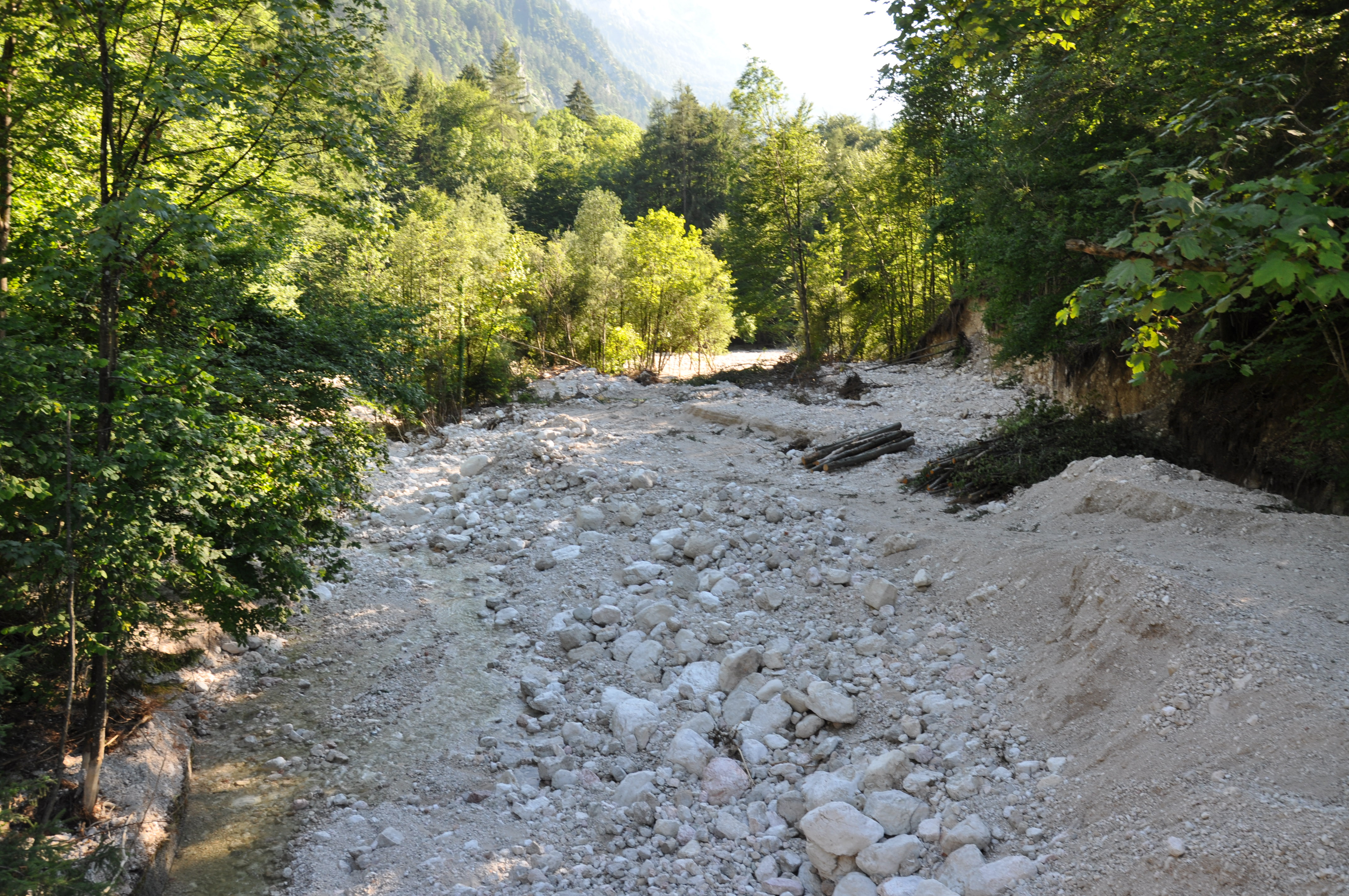 Reste der Mure im Röthelbach bei Baumgarten direkt nach der B 21 Bei Verwendung bitte ich hier um einen Hinweis, wo das Foto genutzt wird.